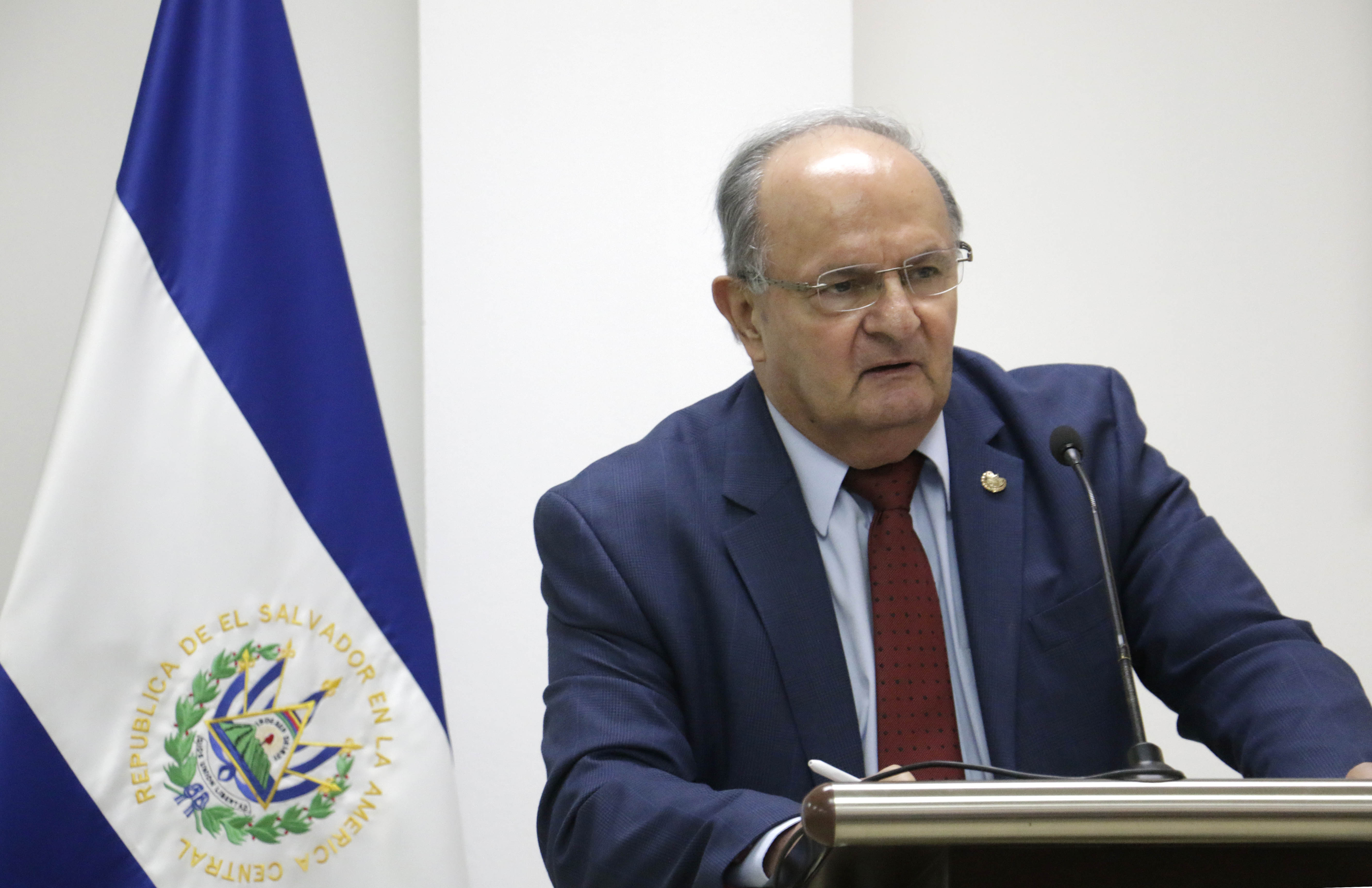 Hato Hasbún, Secretario de Gobernabilidad.